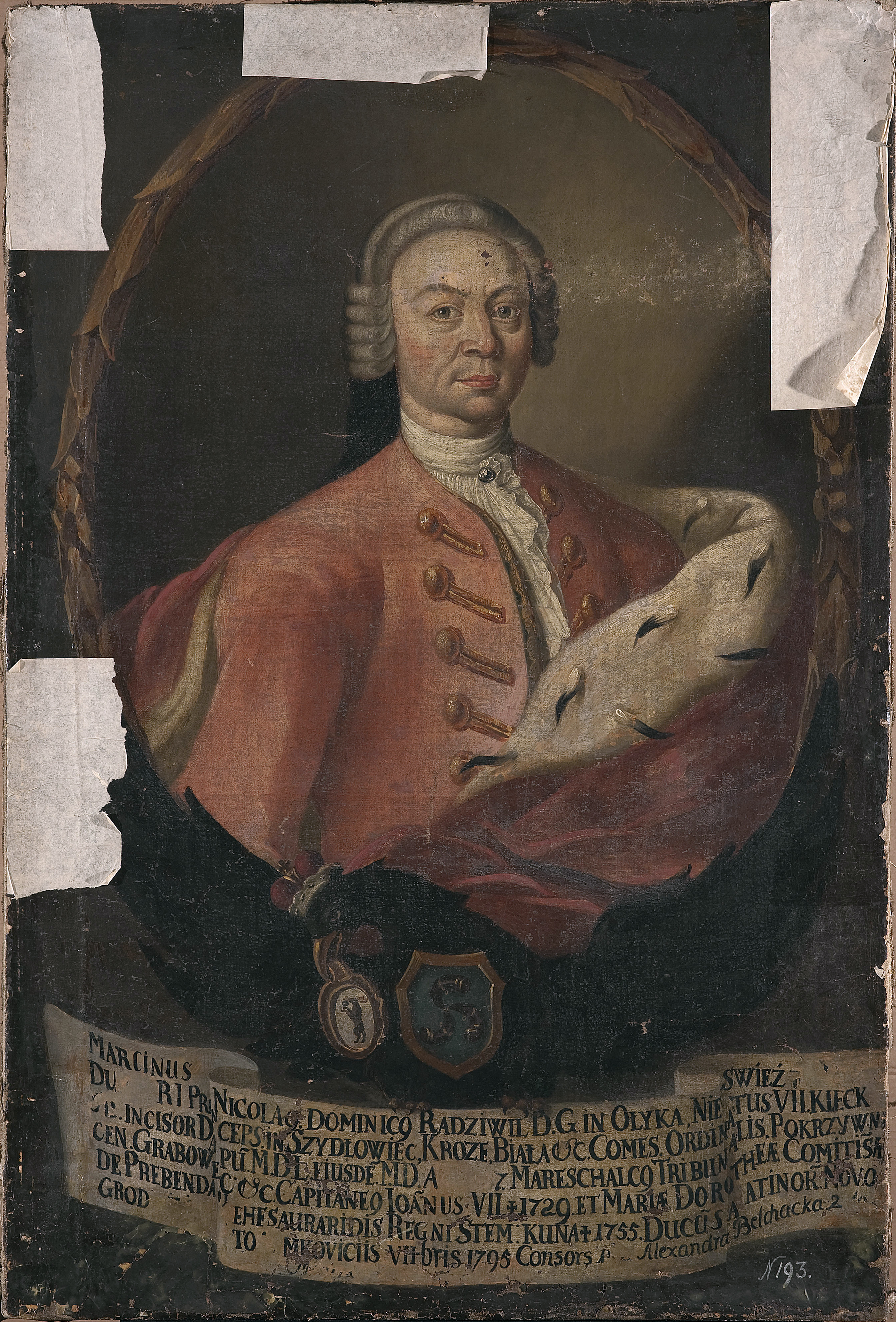 Беларуская (тарашкевіца): Партрэт Марціна Мікалая Радзівіла (Marcin Mikałaj Radzivił)